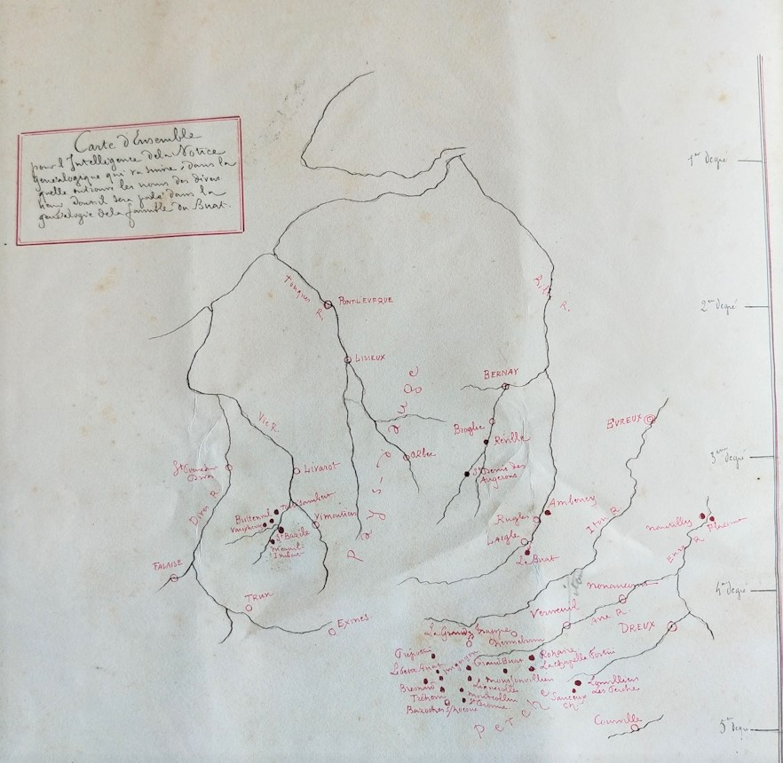 Géographie - Toponymie liée à la famille du Buat